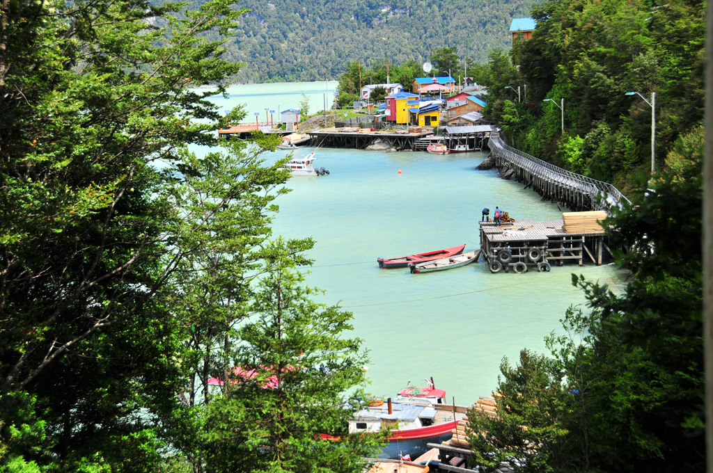 Vista de Caleta Tortel